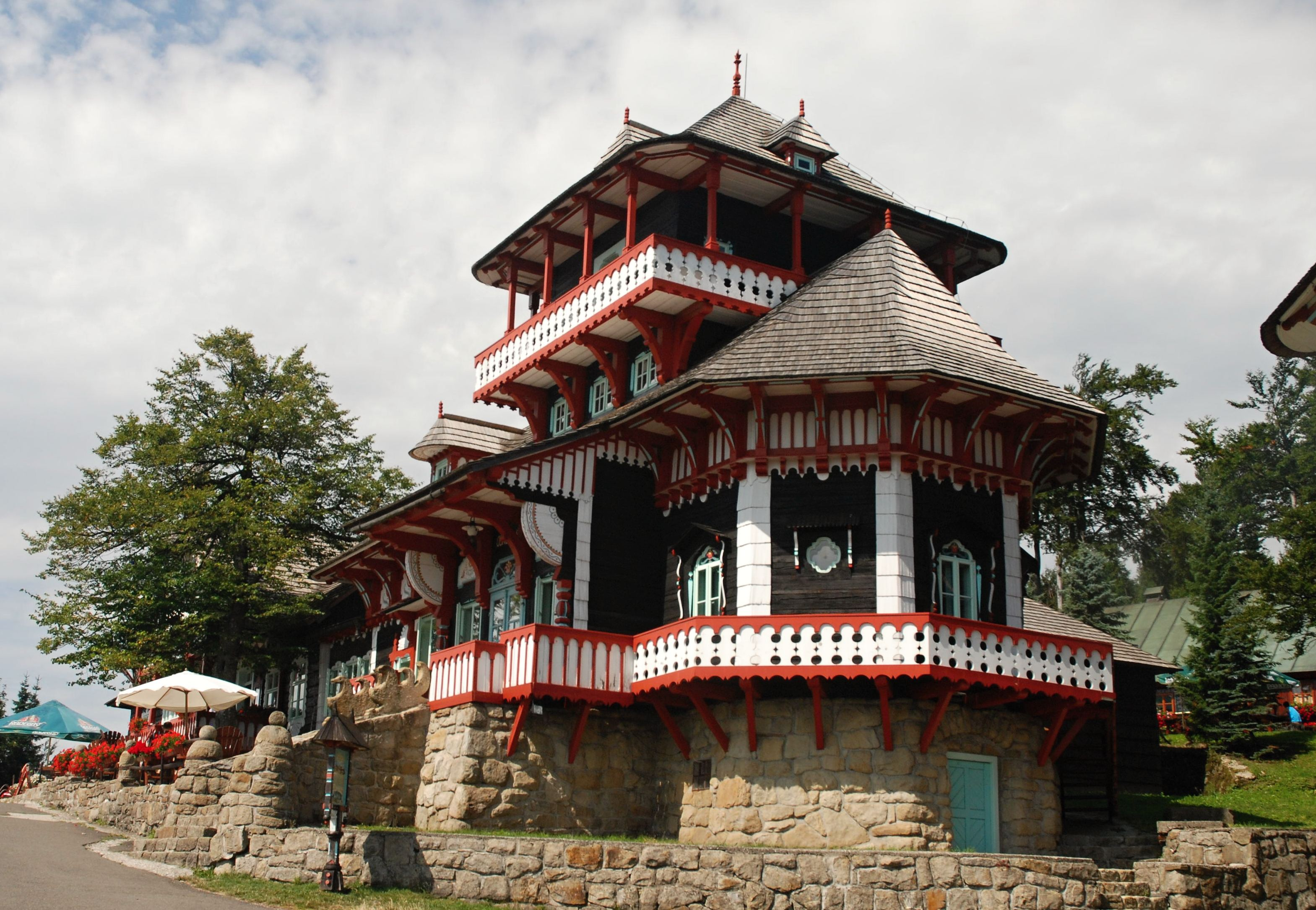 Libušín před požárem